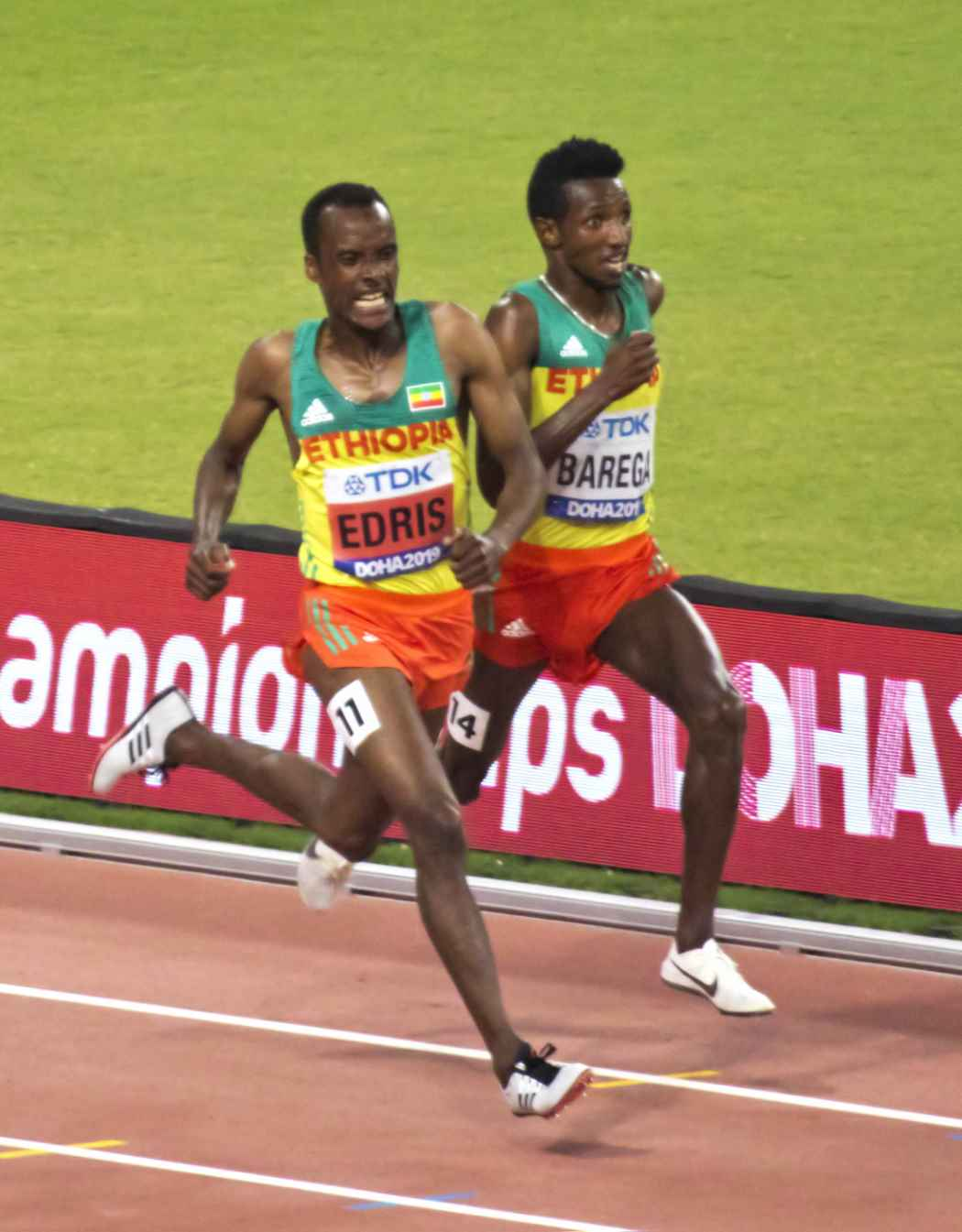 DOH40139 5000m men final